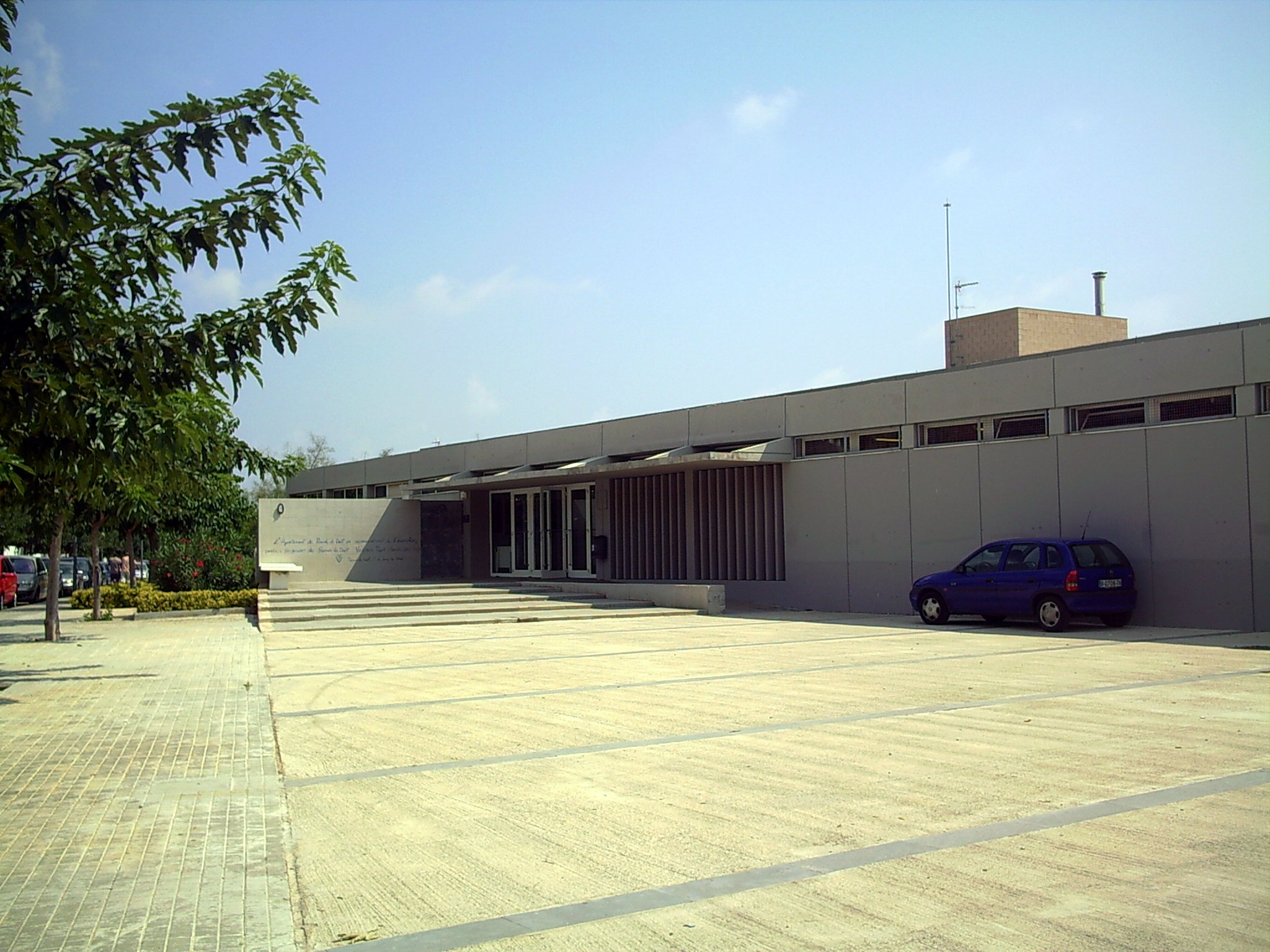 Institut d'Ensenyament Secundari Valerià Pujol i Bosch, escriptor, poeta i professor (1952-1992), a Premià de Dalt. Inaugurat l'any 2001.